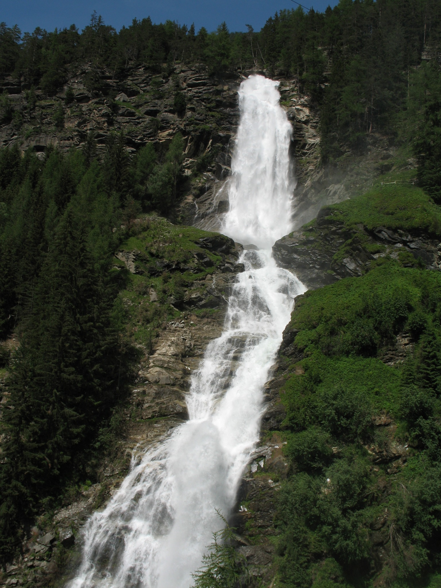 Stuibenfall, Umhausen, fotografiert am 15.6.2006 von Christoph Praxmarer.